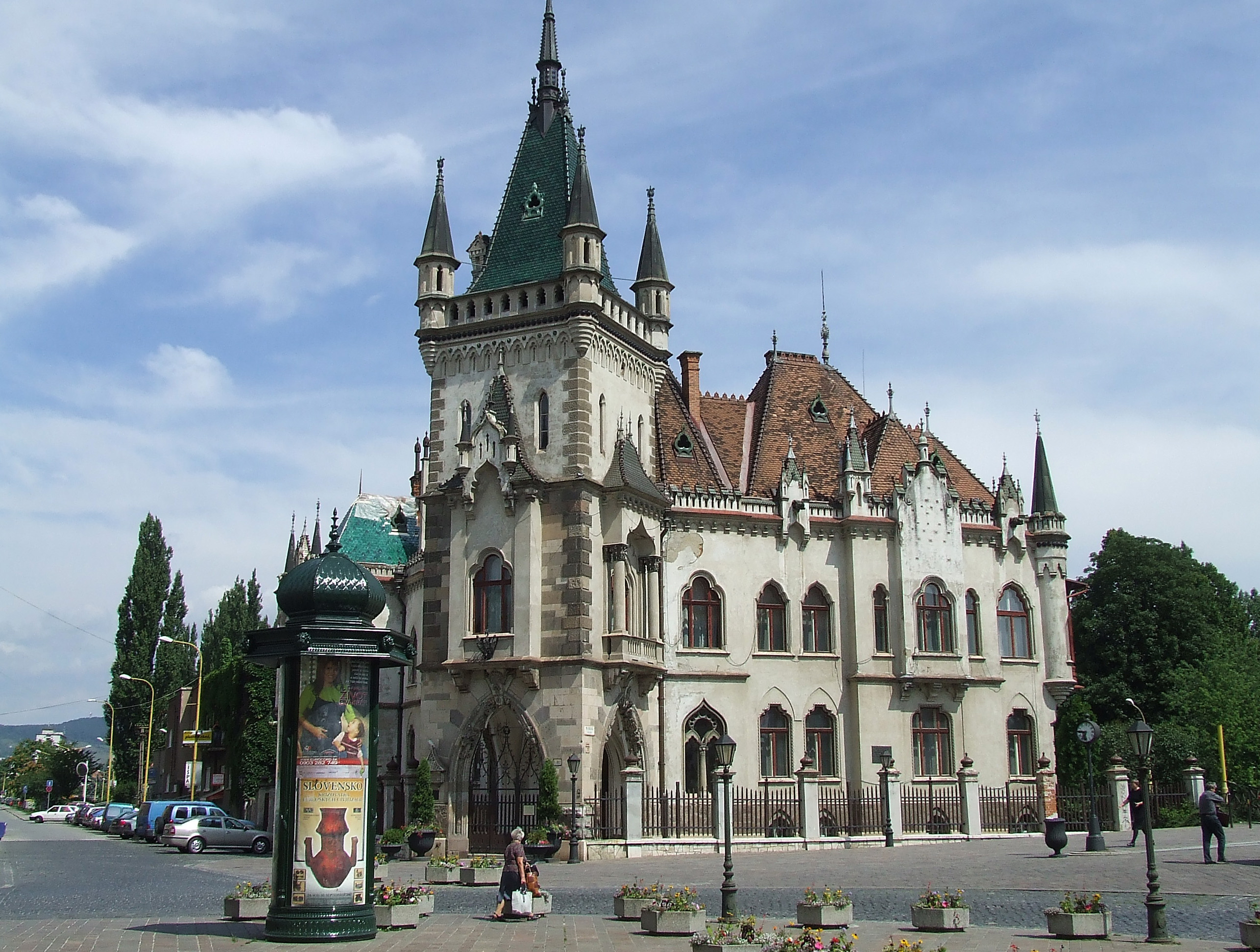 Jakabov palác v Košiciach